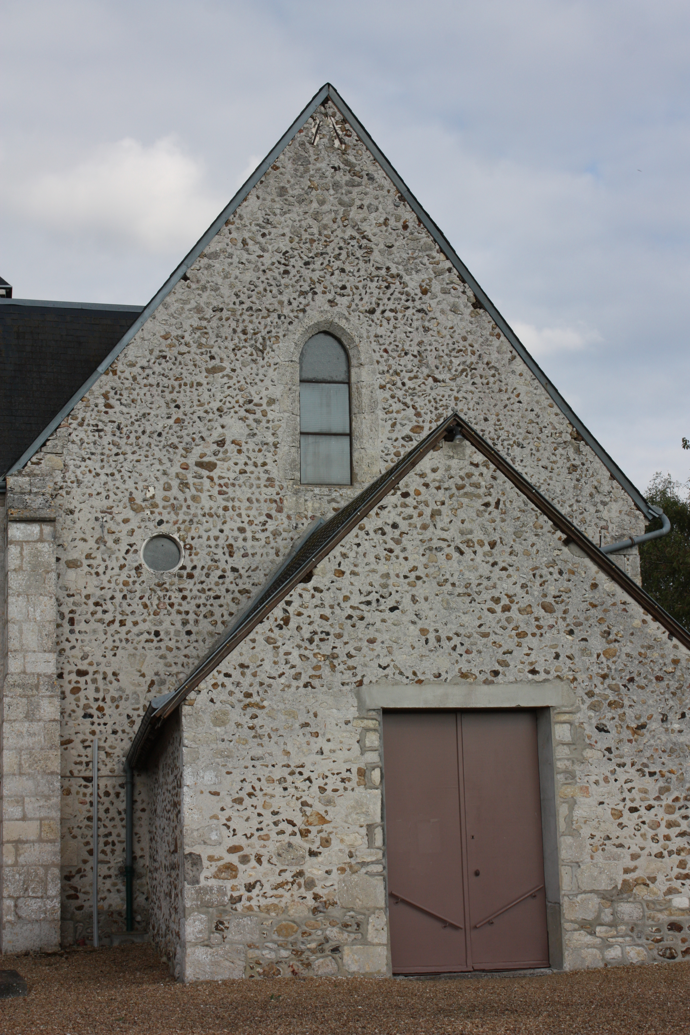 Champseru - Eglise Saint-Martin